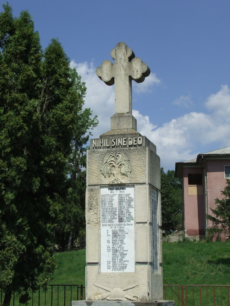 Monument in Borşa, Cluj County, Romania